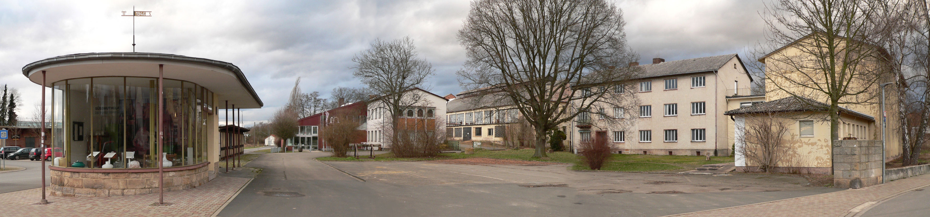 Glasmuseum Immenhausen (rotes Gebäude und weißer Anbau) auf dem Gelände der ehemaligen Glashütte Süßmuth